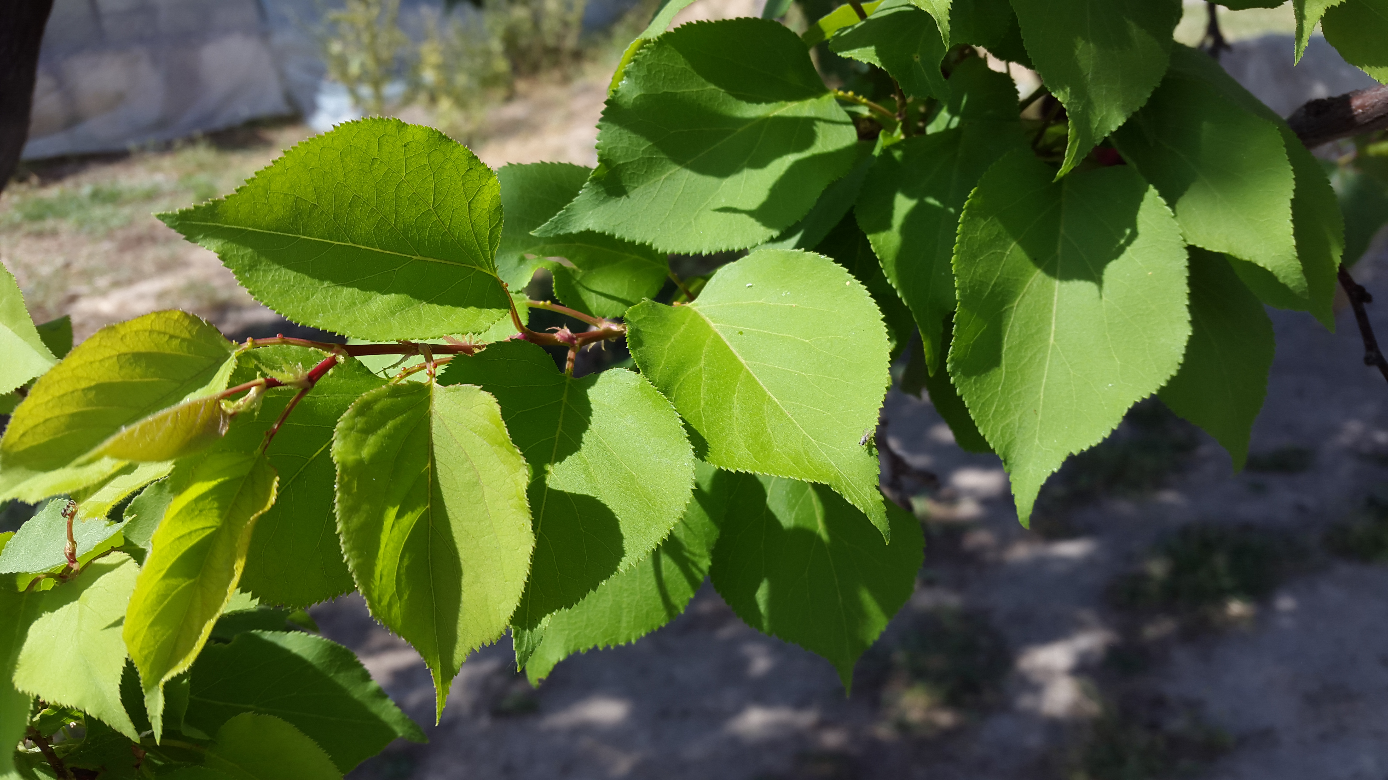 Здоровые листья абрикоса